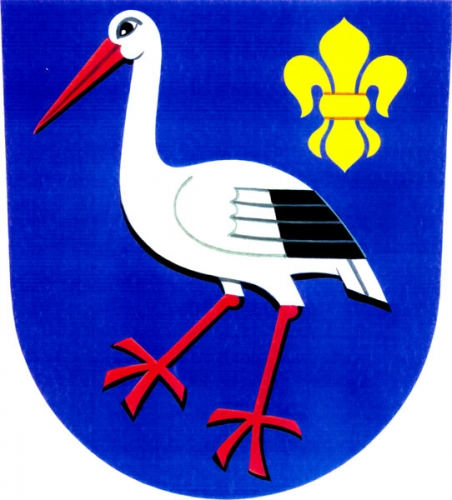 Znak, Zvole , okres Šumperk